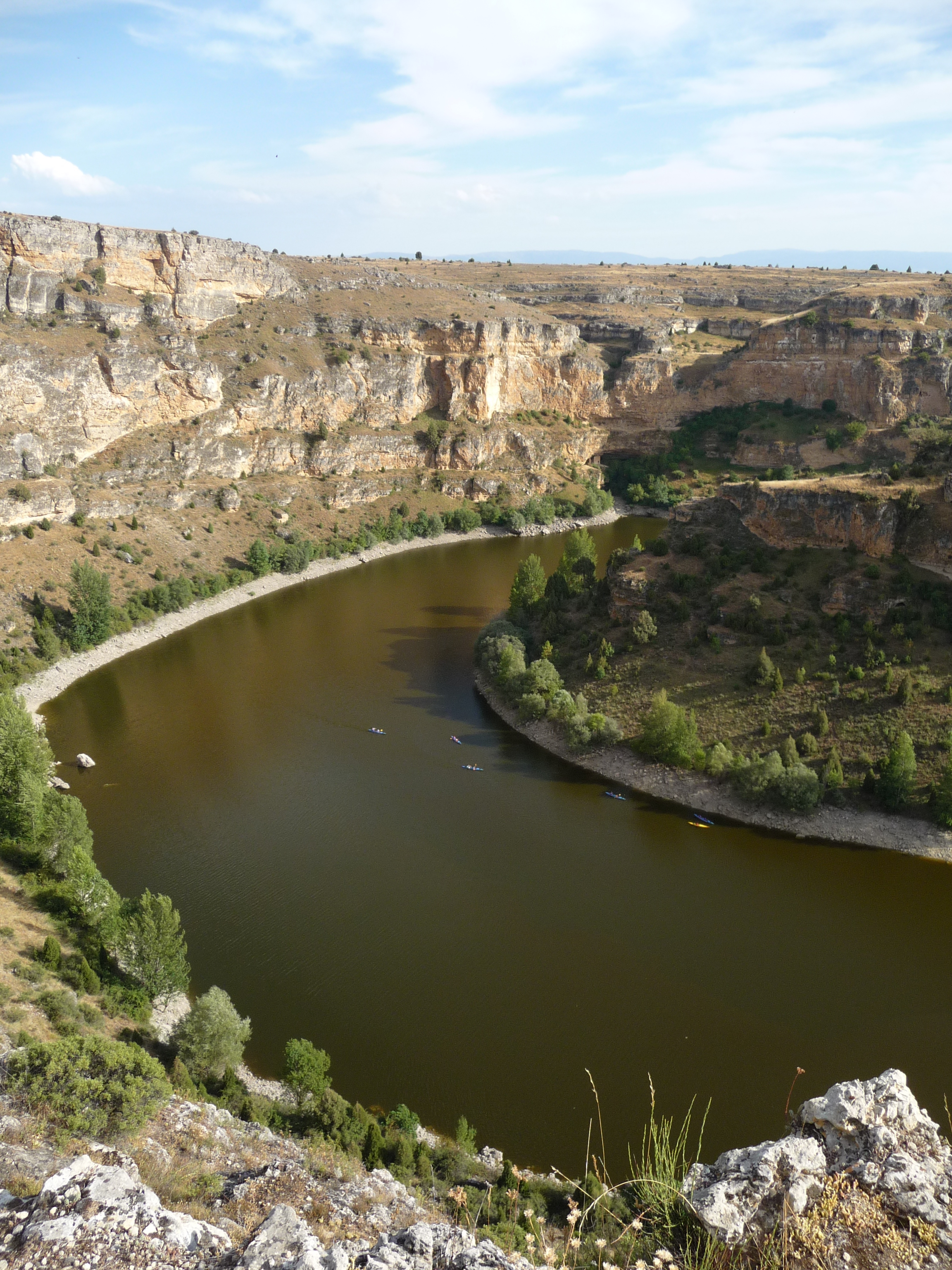 Canoas paseando por las Hoces del río Duratón